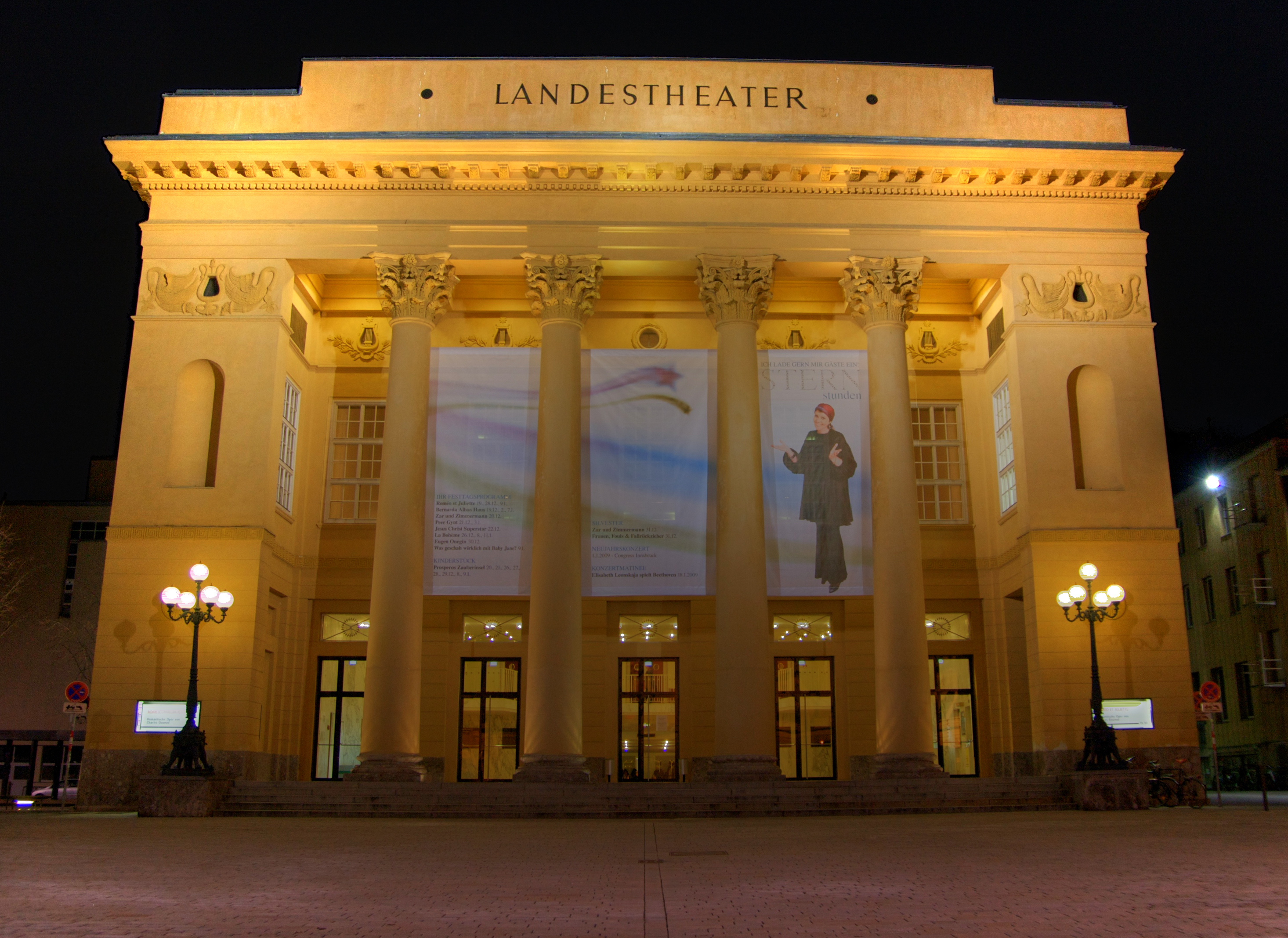 Landestheater Innsbruck bei Nacht Object location47° 16′ 10.17″ N, 11° 23′ 45.64″ E